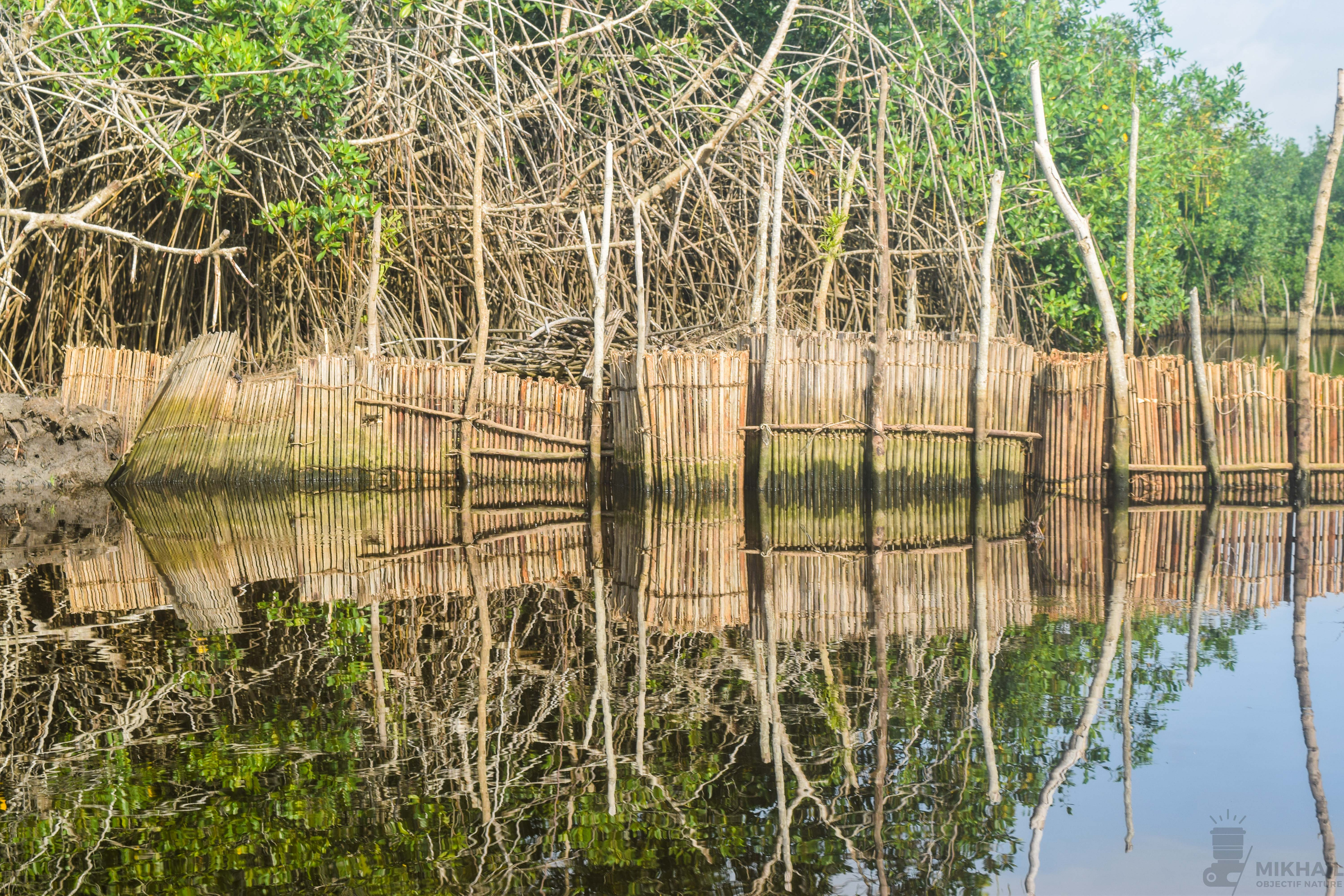 Barrage pour piéger les poissons proche de Kpèco dans l'ACCB-Bouche du Roy avec destruction de mangroves.